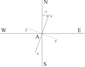 Станцията на жиромахалото гледана отгоре